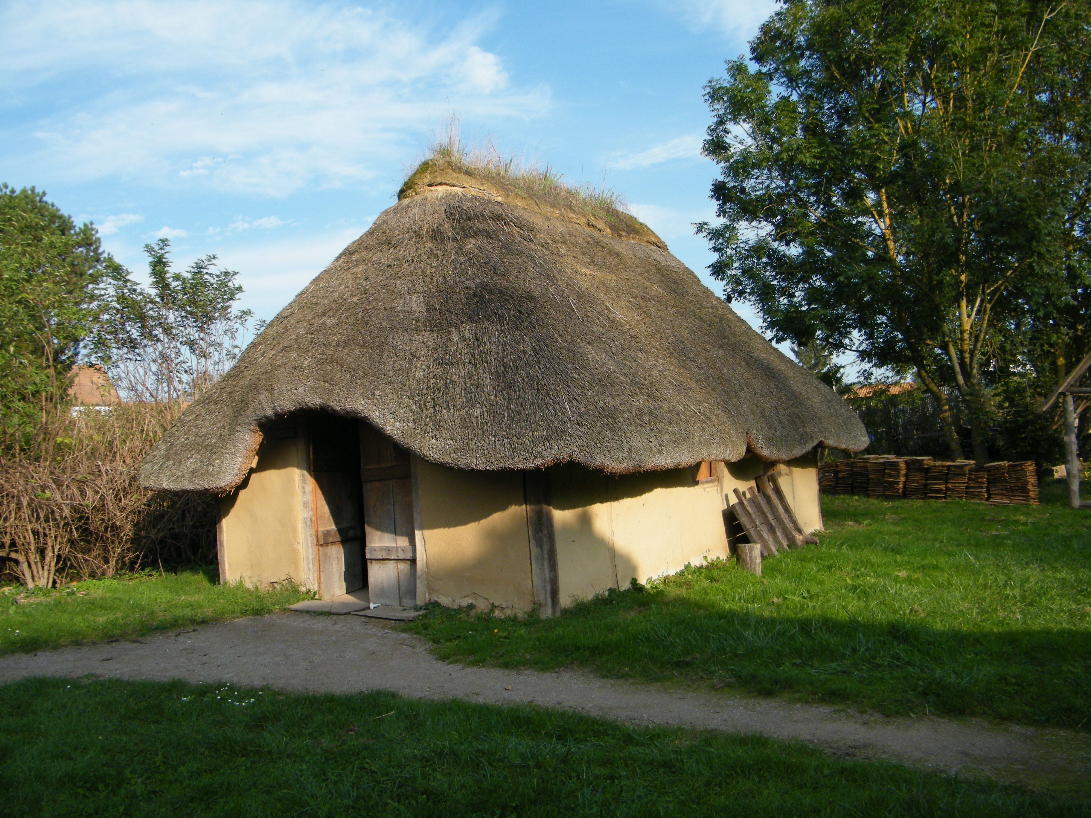 Pont-Rémy, Somme, Fr, Ambiani, habitation gauloise.